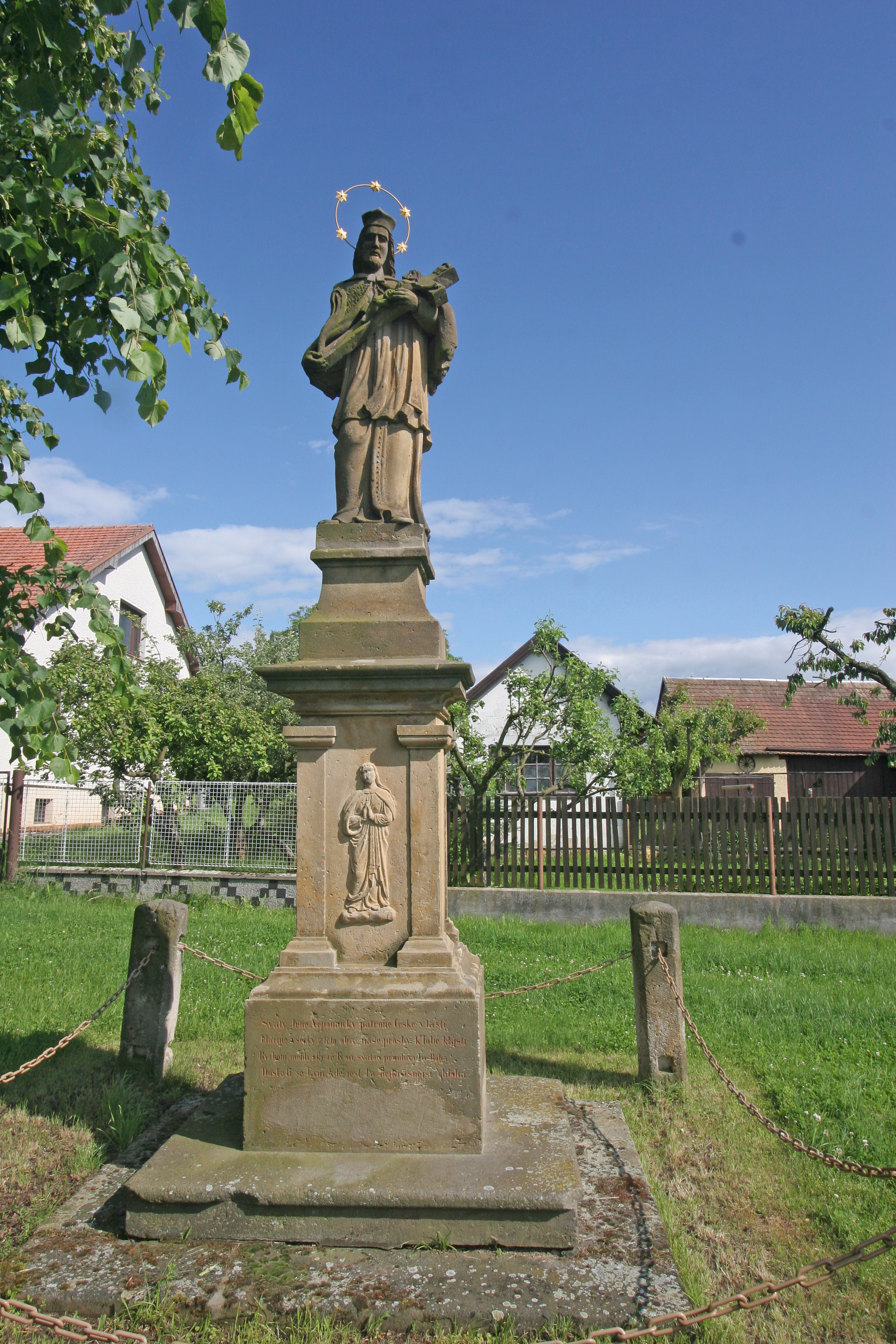 Zdechovice svatý Jan Nepomucký